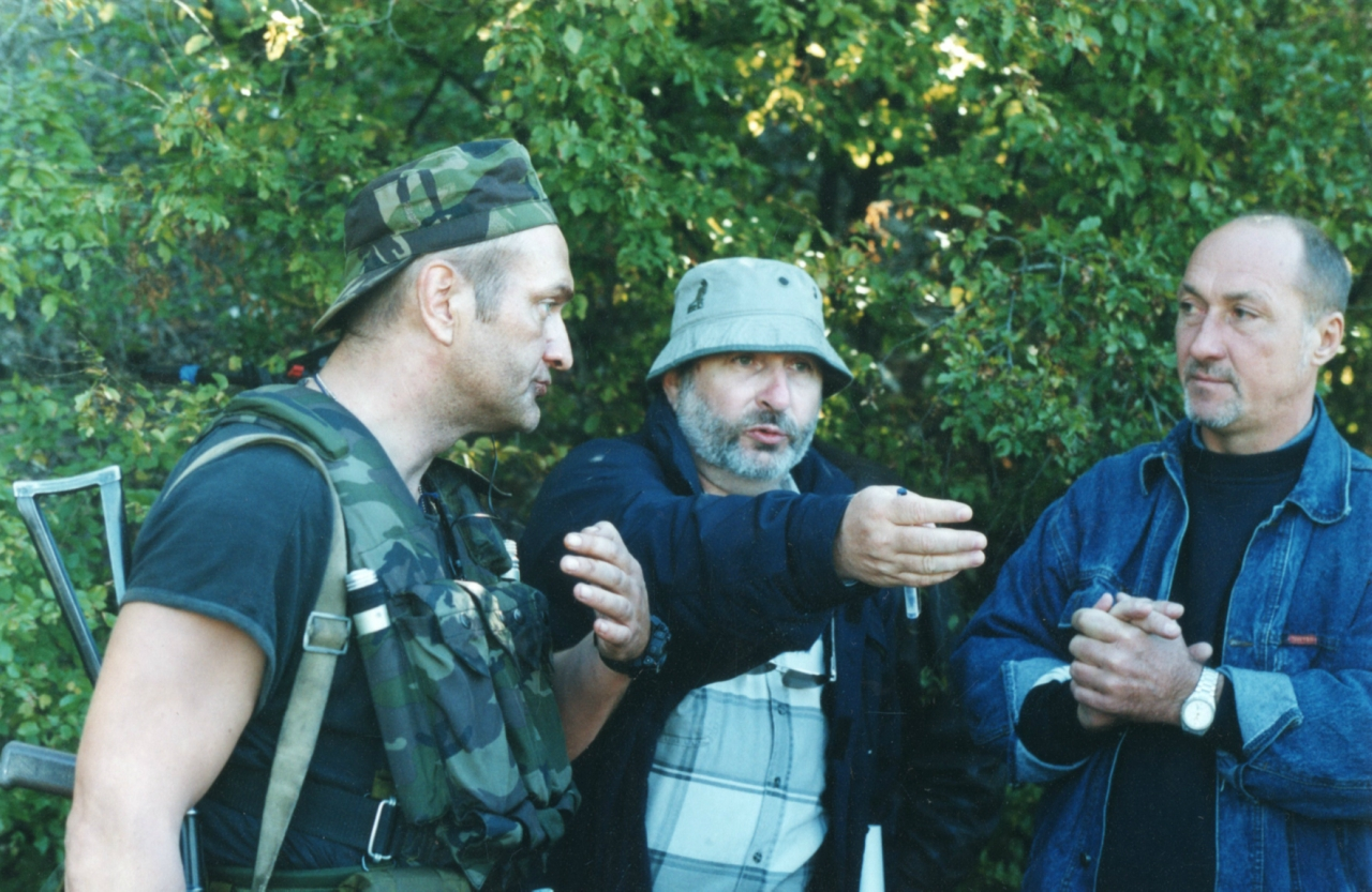 В.Спорышков, А.Малюков, А.Балуев